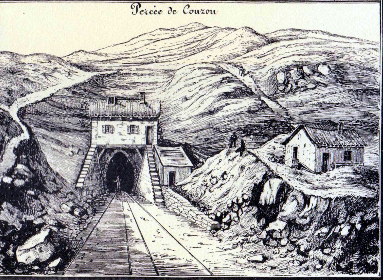 dessin